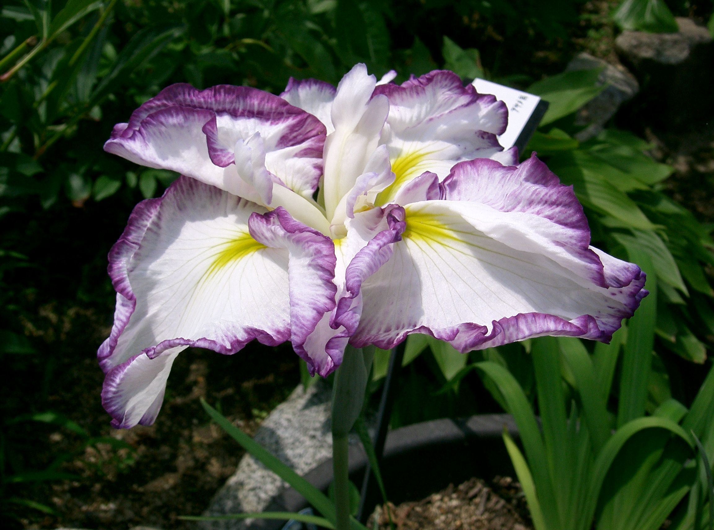 Iris ensata cv. 'kumoinokari'